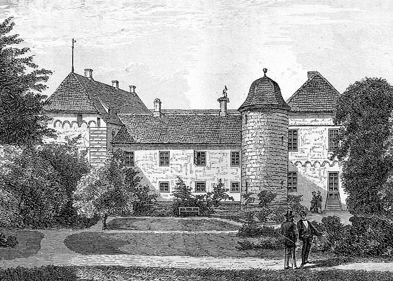 Arreskov er en gammel hovedgård, som nævnes første gang i 1210. Det er nu det tredie Arreskov vi ses idag, det nye voldsted er anlagt i 1558. Gården ligge i Øster Hæsinge Sogn, Sallinge Herred, Faaborg Kommune. Hovedbygningen er opført i 1568-1580